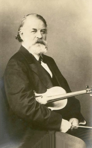 Joachim József magyar hegedűművész, karmester és zeneszerző.